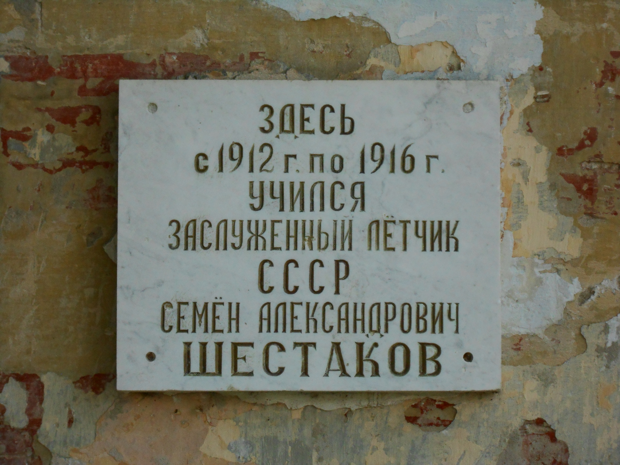 Мемориальная доска на здании бывшего Реального училища в Бендерах. На момент съёмки школа находилась в аварийном состоянии, что частично видно на изображении.